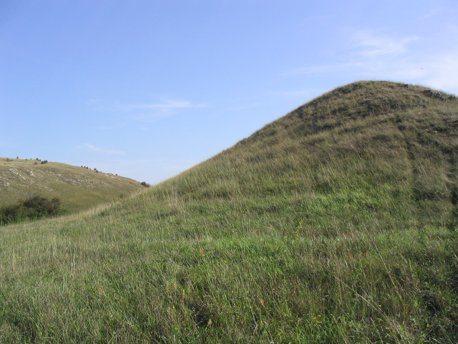 Fátlan táj Kádárta és Hajmáskér között